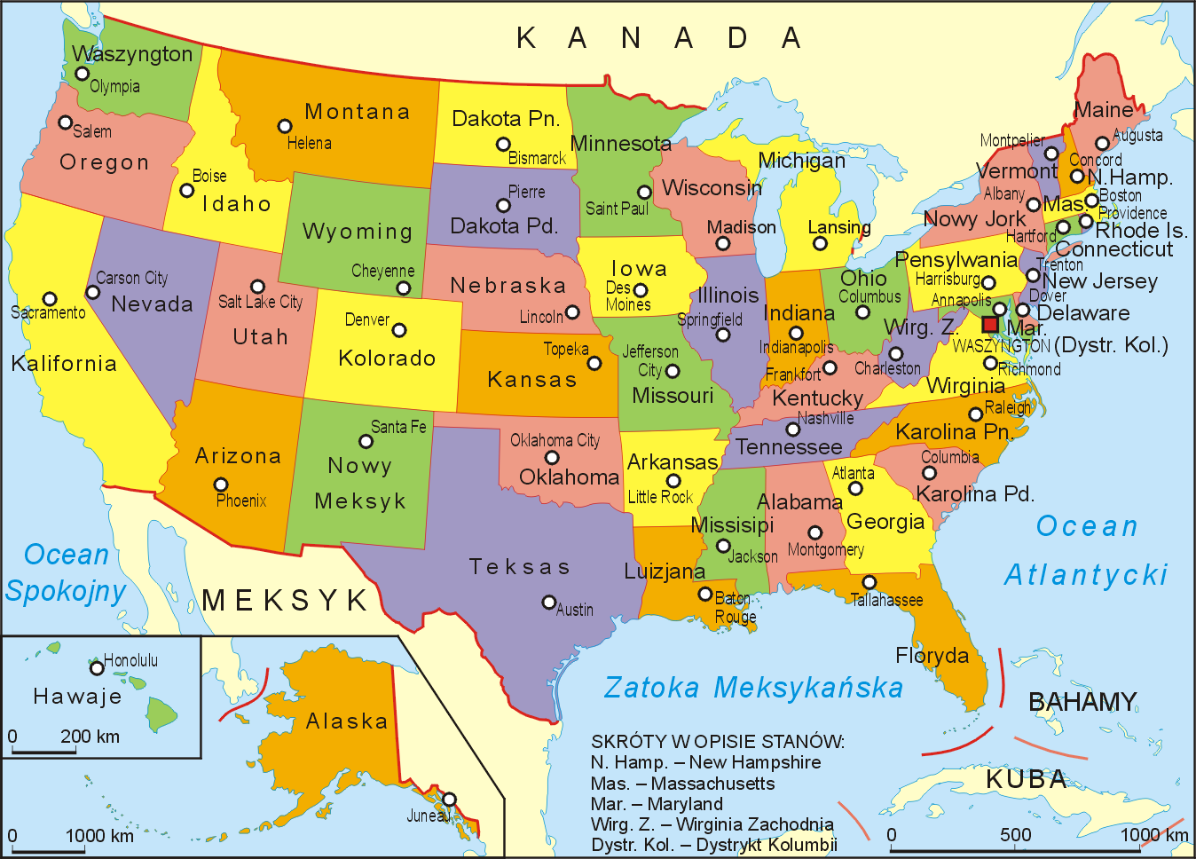 Stany Zjednoczone-mapa administracyjna